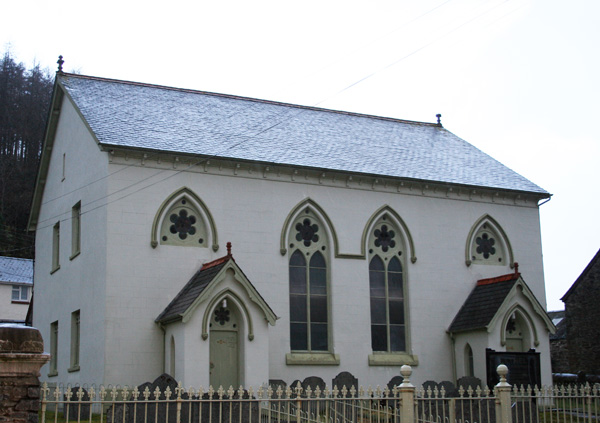 Bathel, Capel yr Annibynwyr, Tal-y-bont, Ceredigion